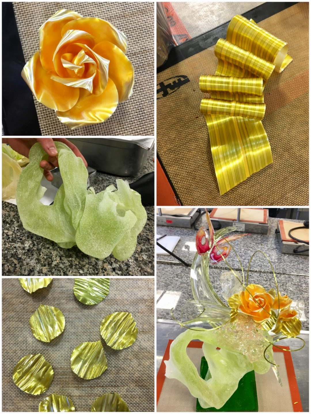 Démonstration de décors en sucre